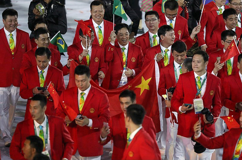 Делегация Китайской народной республики на церемонии открытия Летних олимпийских игр 2016 в Рио-де-Жанейро